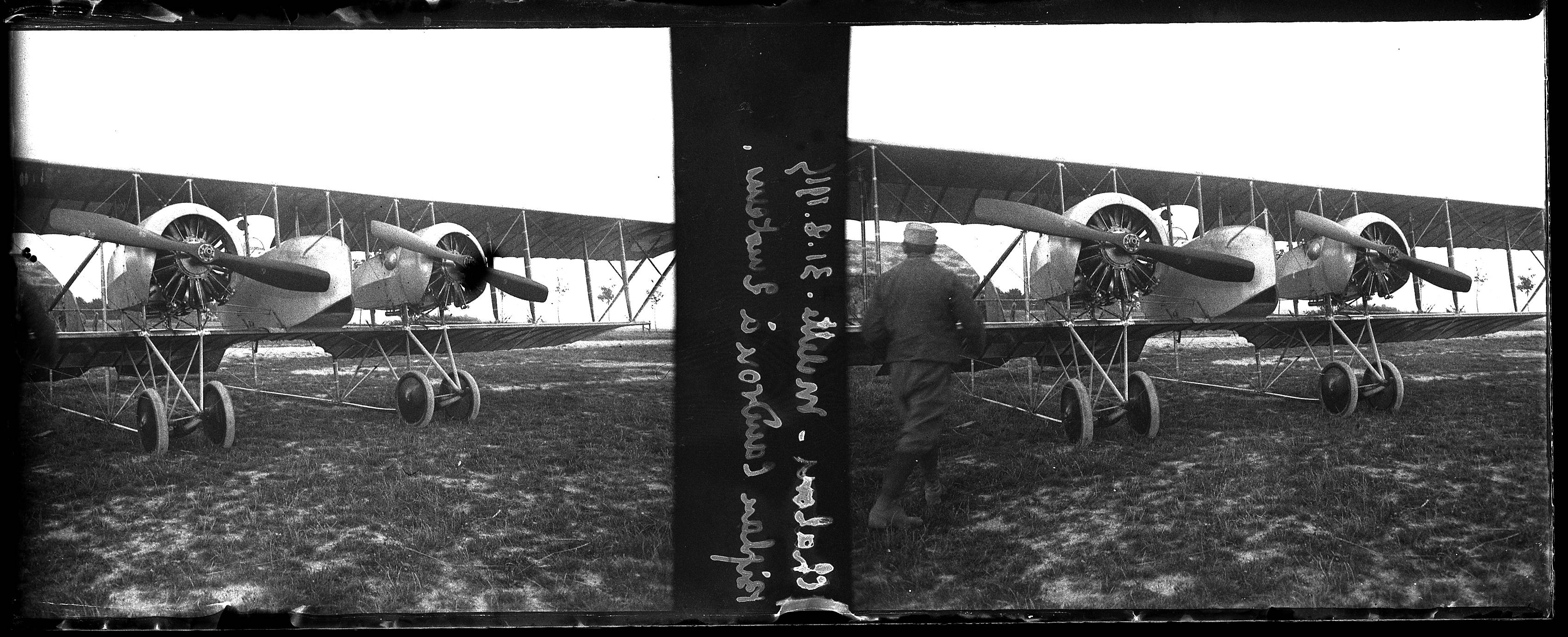 Vue d'ensemble d'un avion biplan Caudron G.4 bimoteur stationné dans un champ d'aviation à Chalons-Melette, sur la commune de l'Epine (Marne). 31 août 1915. Guerre 1914-1918.